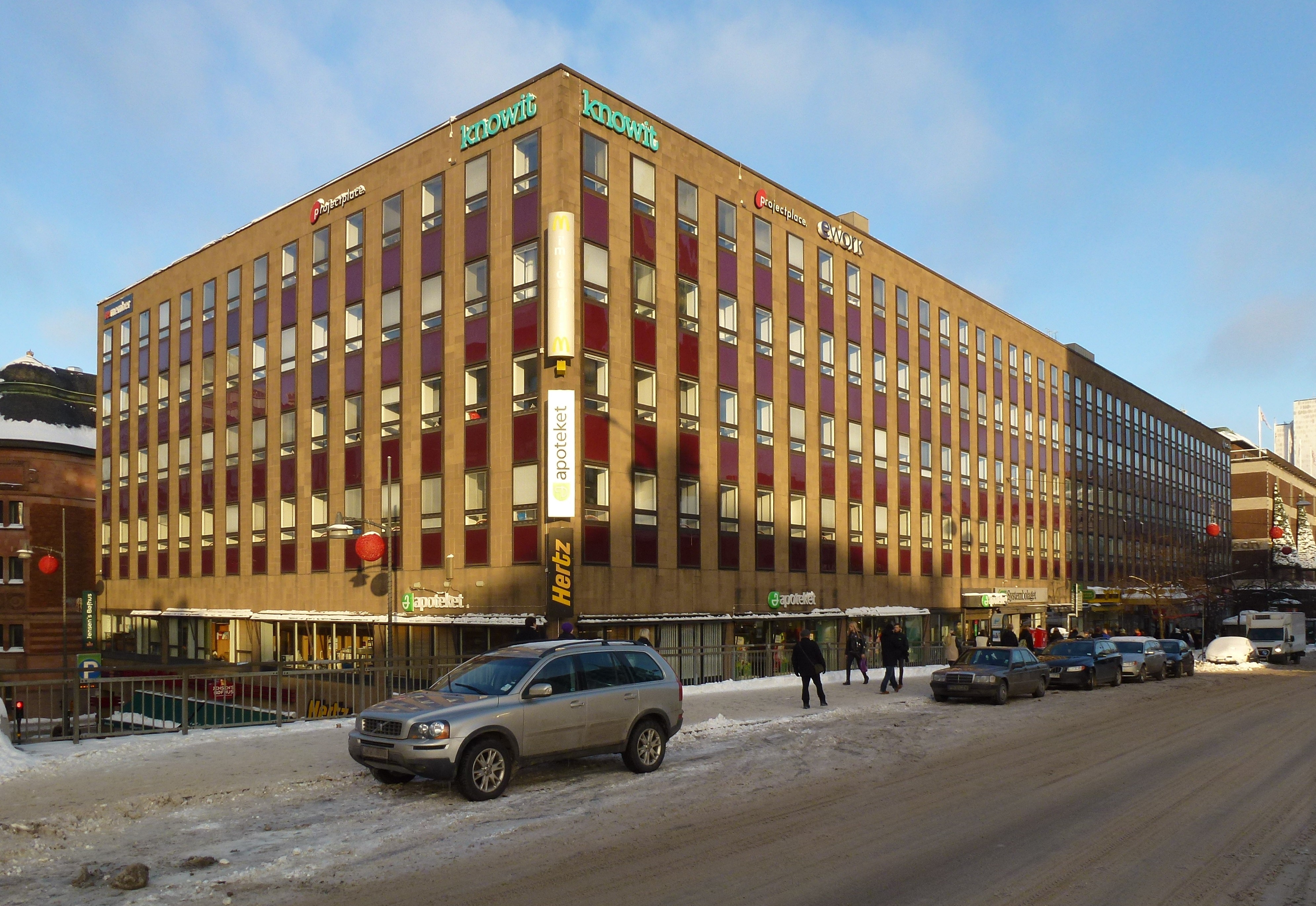 Fastigheten Orgelpipan 7, Klarabergsgatan 56-64